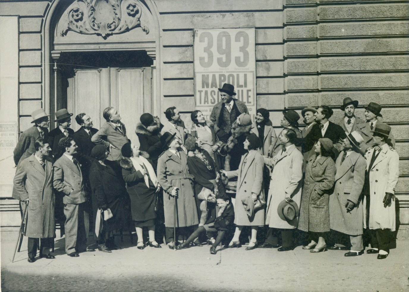 La compagnia Viviani nel 1928 a piazza Carlo Felice